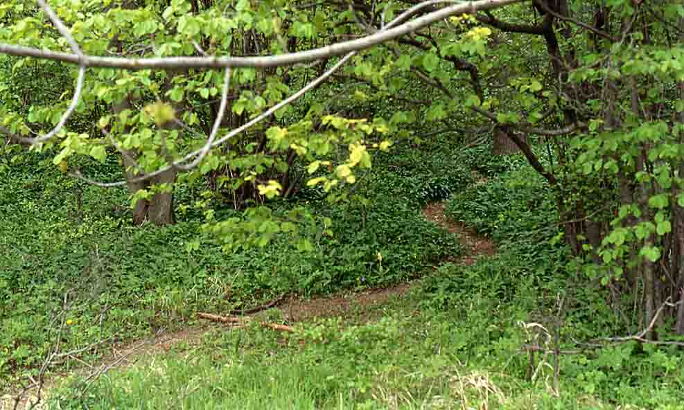 Biotop von Orchis pallens (Einzelex. etwa in Bildmitte) in Bärlauchwald in der Fränkischen Schweiz